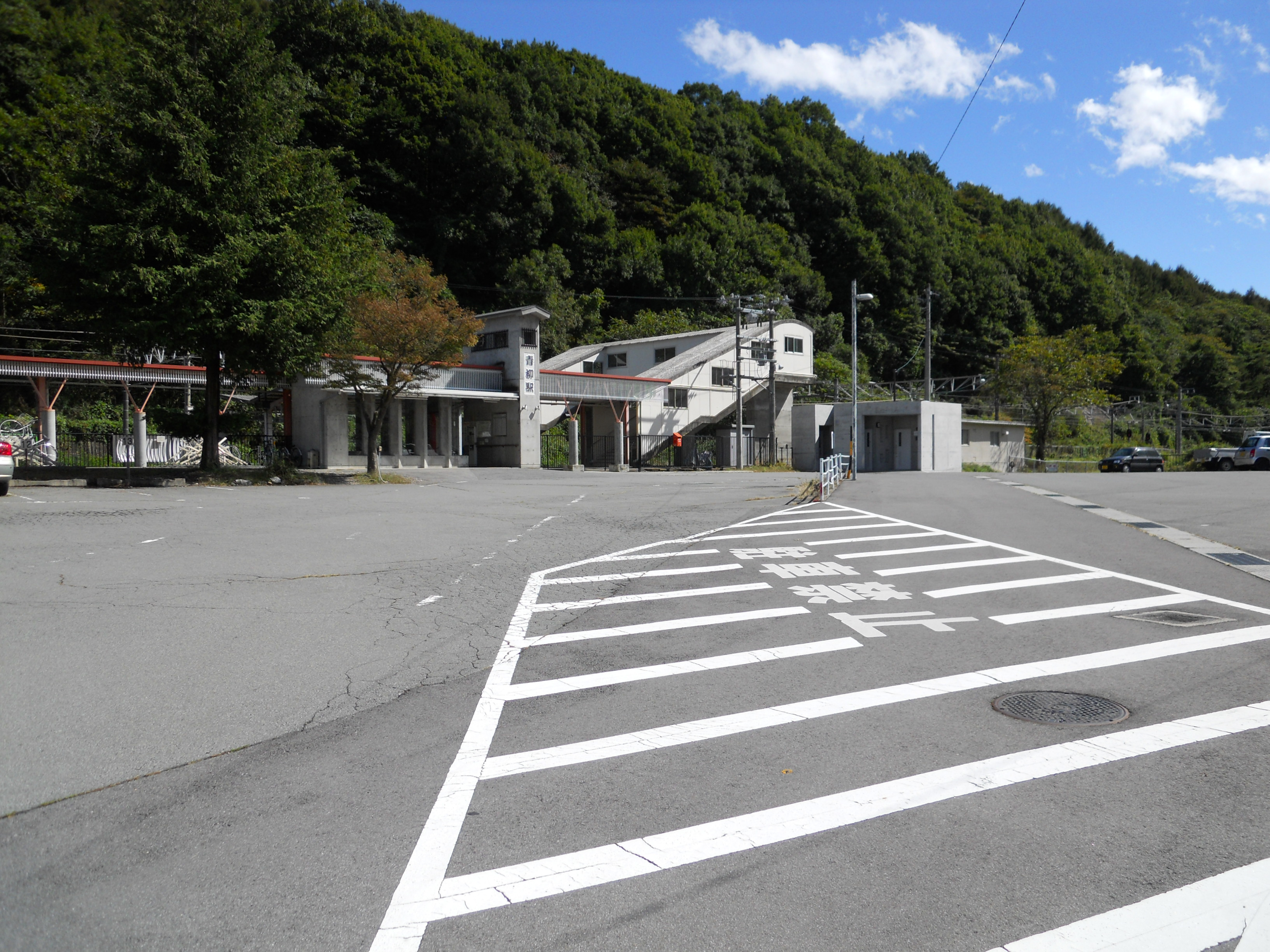 JR中央線青柳駅